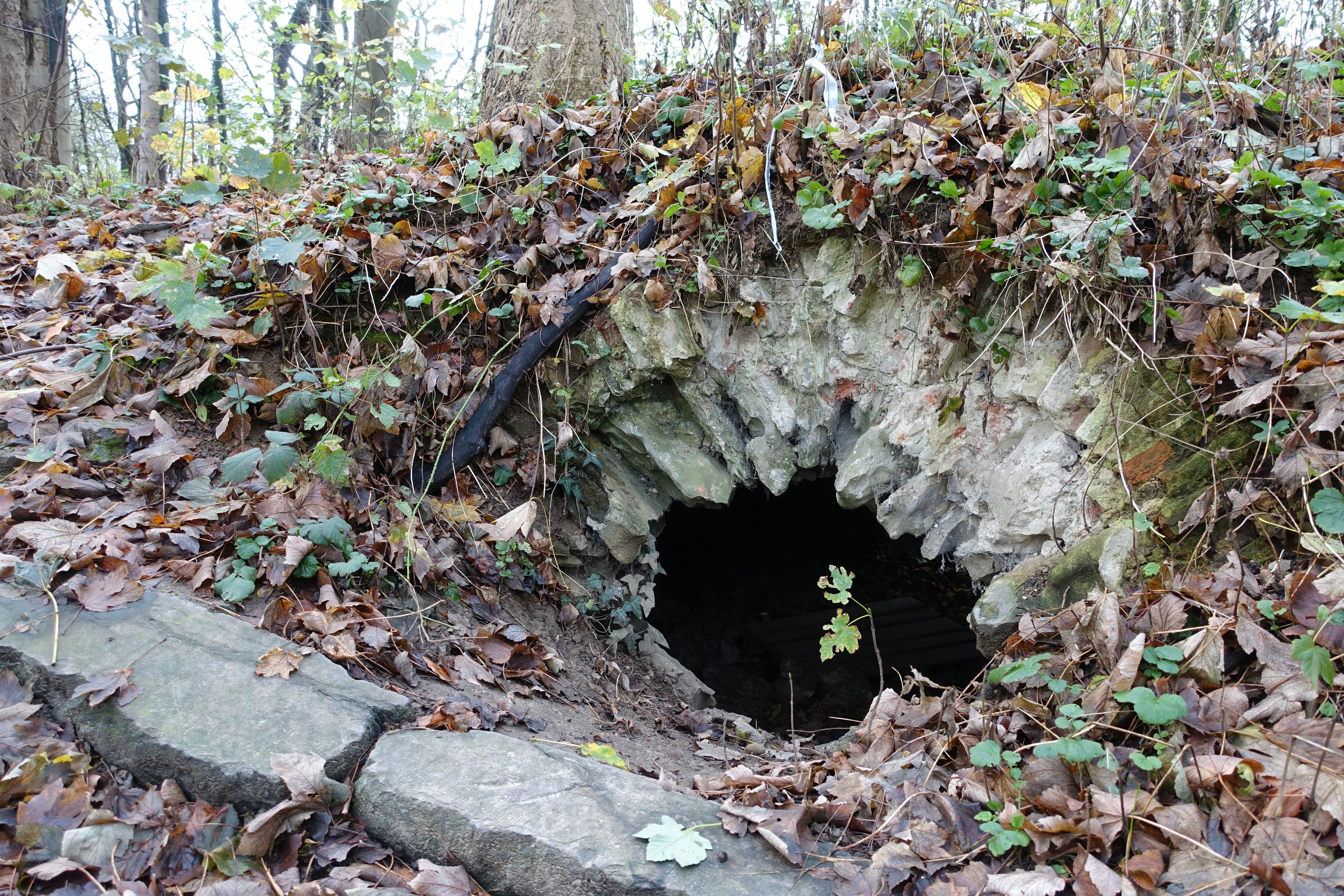 Meest noordelijke ijskelder in Domein Drie Fonteinen, oostelijke ingang